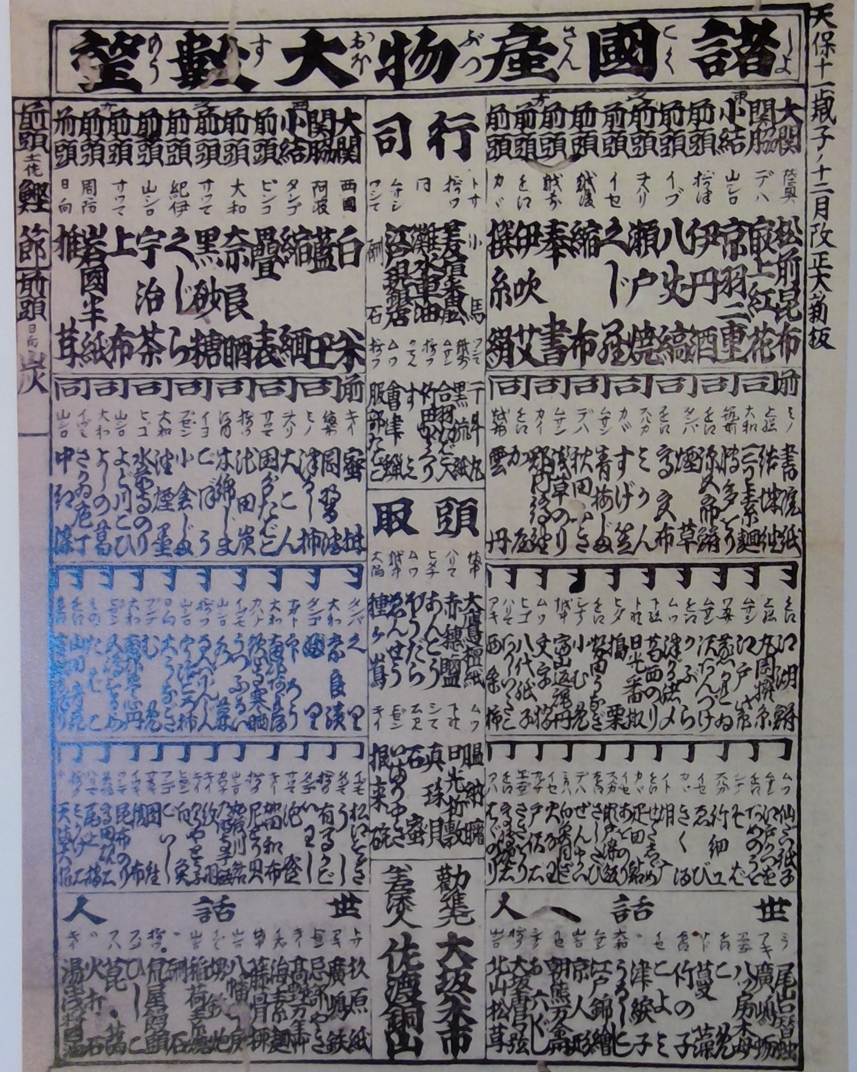 天保11年に発表された「諸国産物大数望」 原資料は大阪府立中之島図書館所蔵